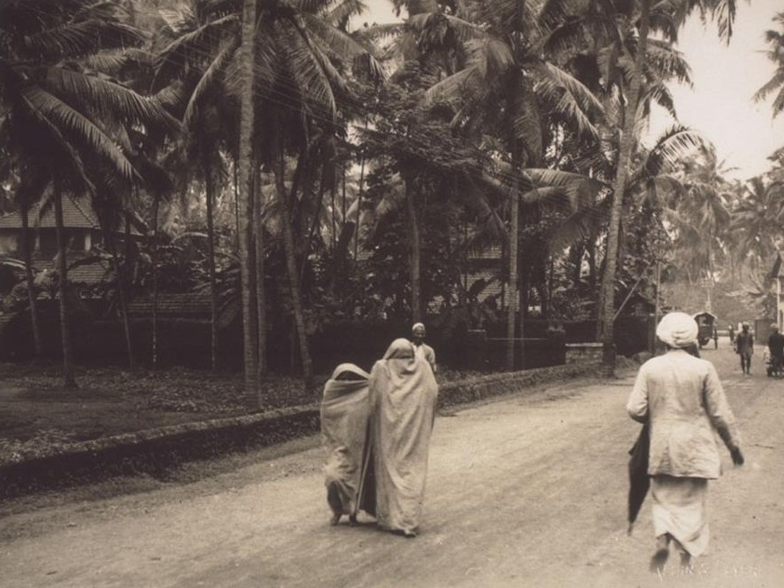 പർദ ധരിച്ച സ്ത്രീകൾ. മലബാറിലെ കാഴ്ച്ച